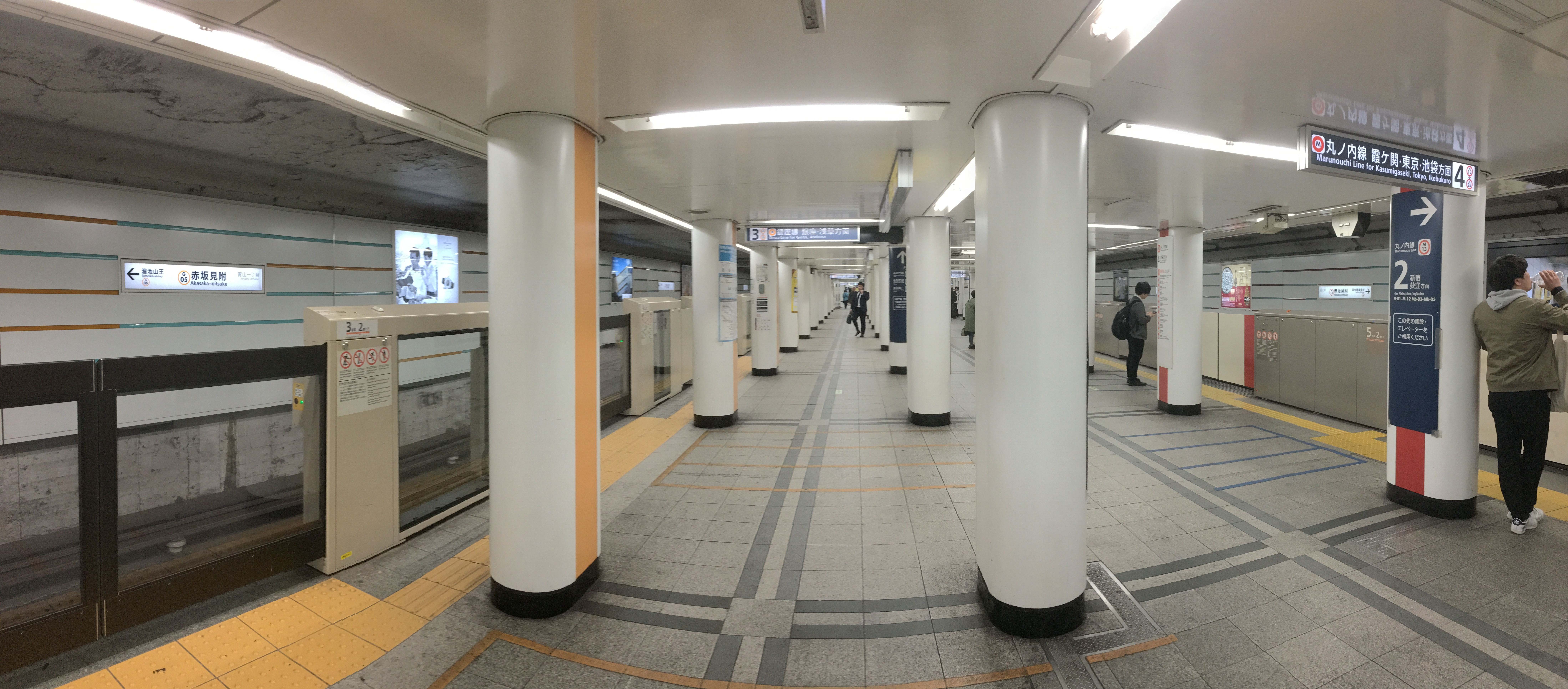 銀座線と丸ノ内線、赤坂見附駅のホーム (Ginza line and Marunouchi Line platform, Akasaka-mitsuke Station)